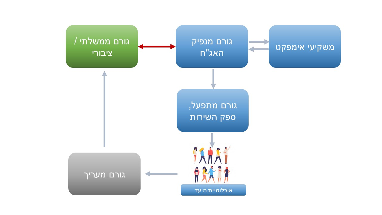 הגורמים המשתתפים באגח חברתיות